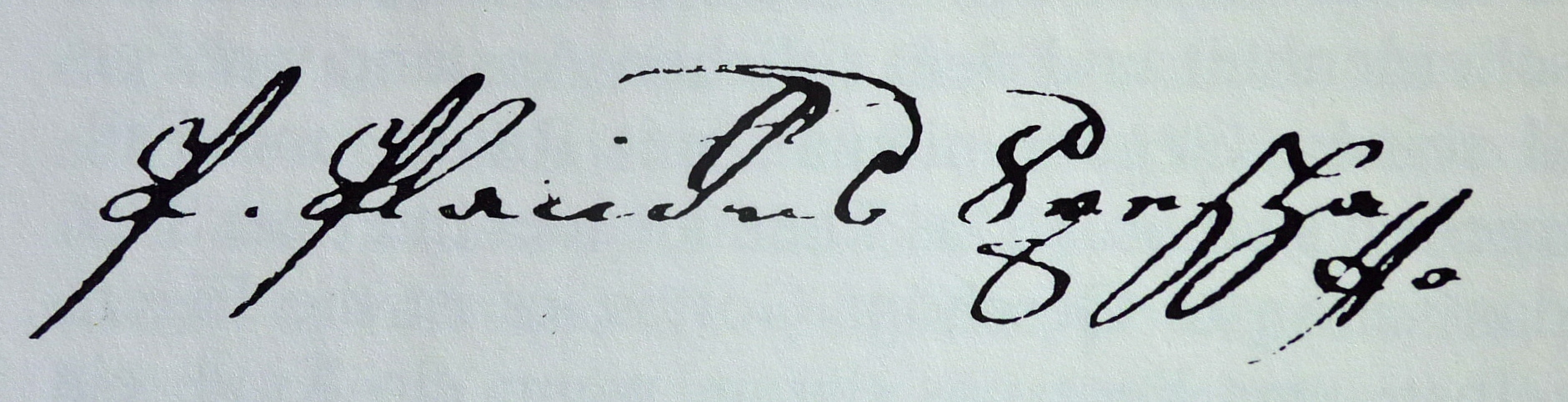 Unterschrift von Placidus a Spescha vom 30. März 1811